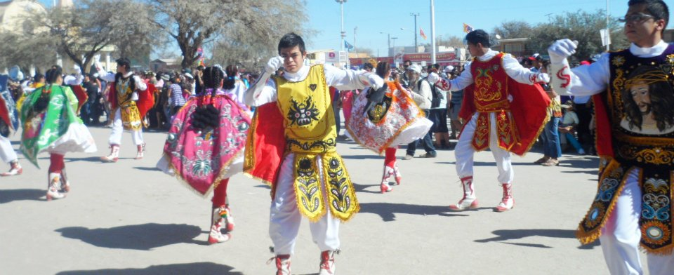 Jovenes bailando Diablada